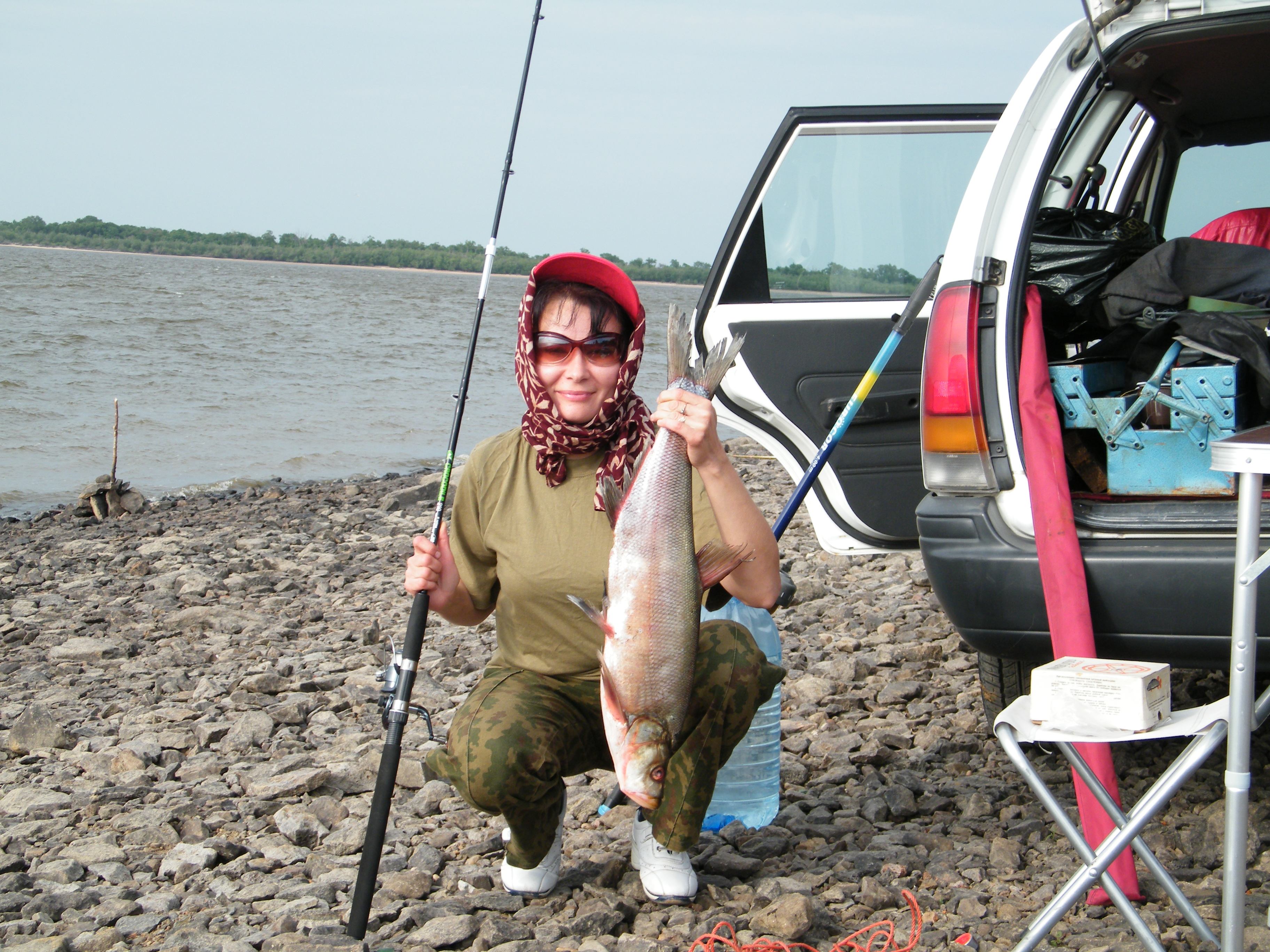 Аня поймала верхогляда